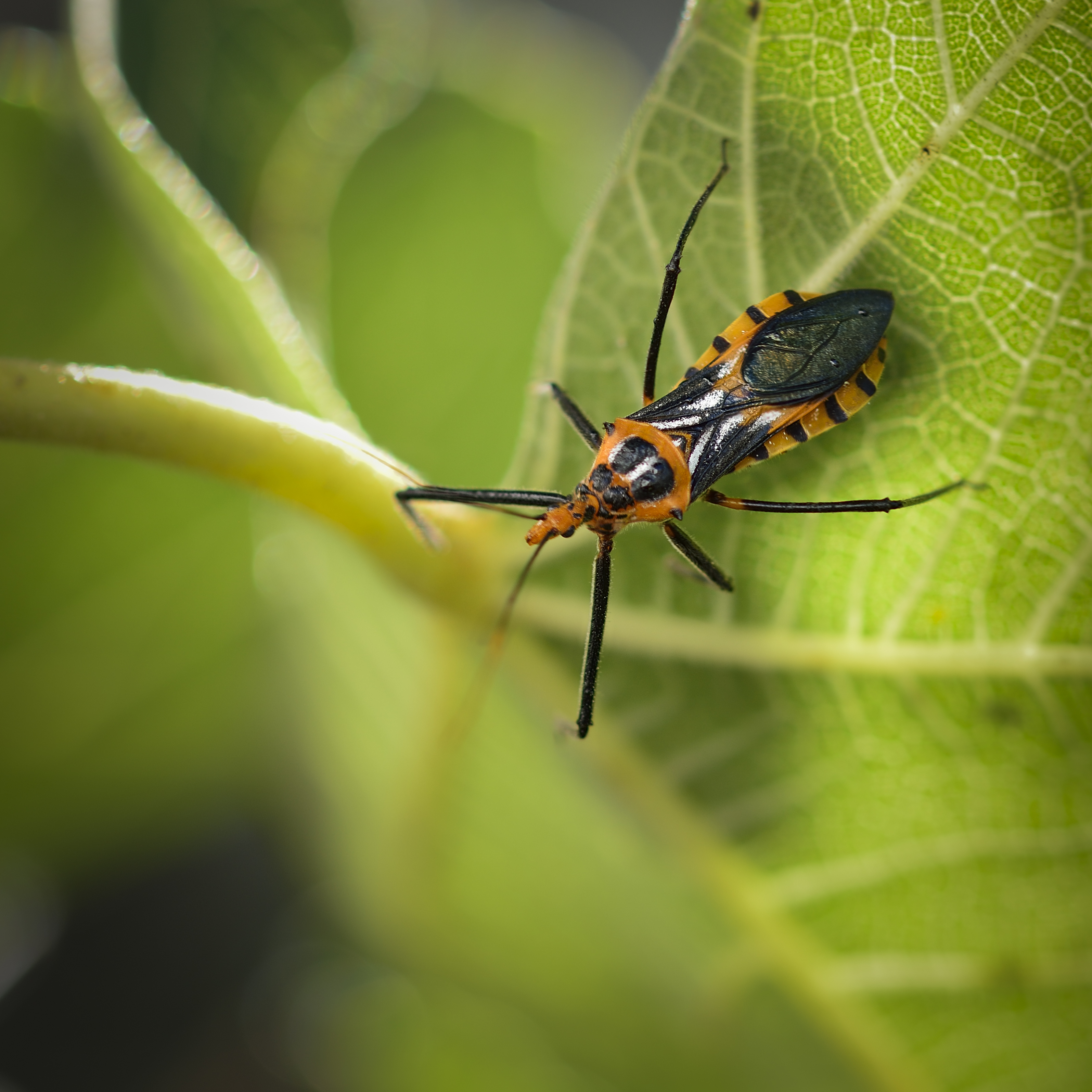 Una chinche asesina en una planta de higos a la espera de una mosca